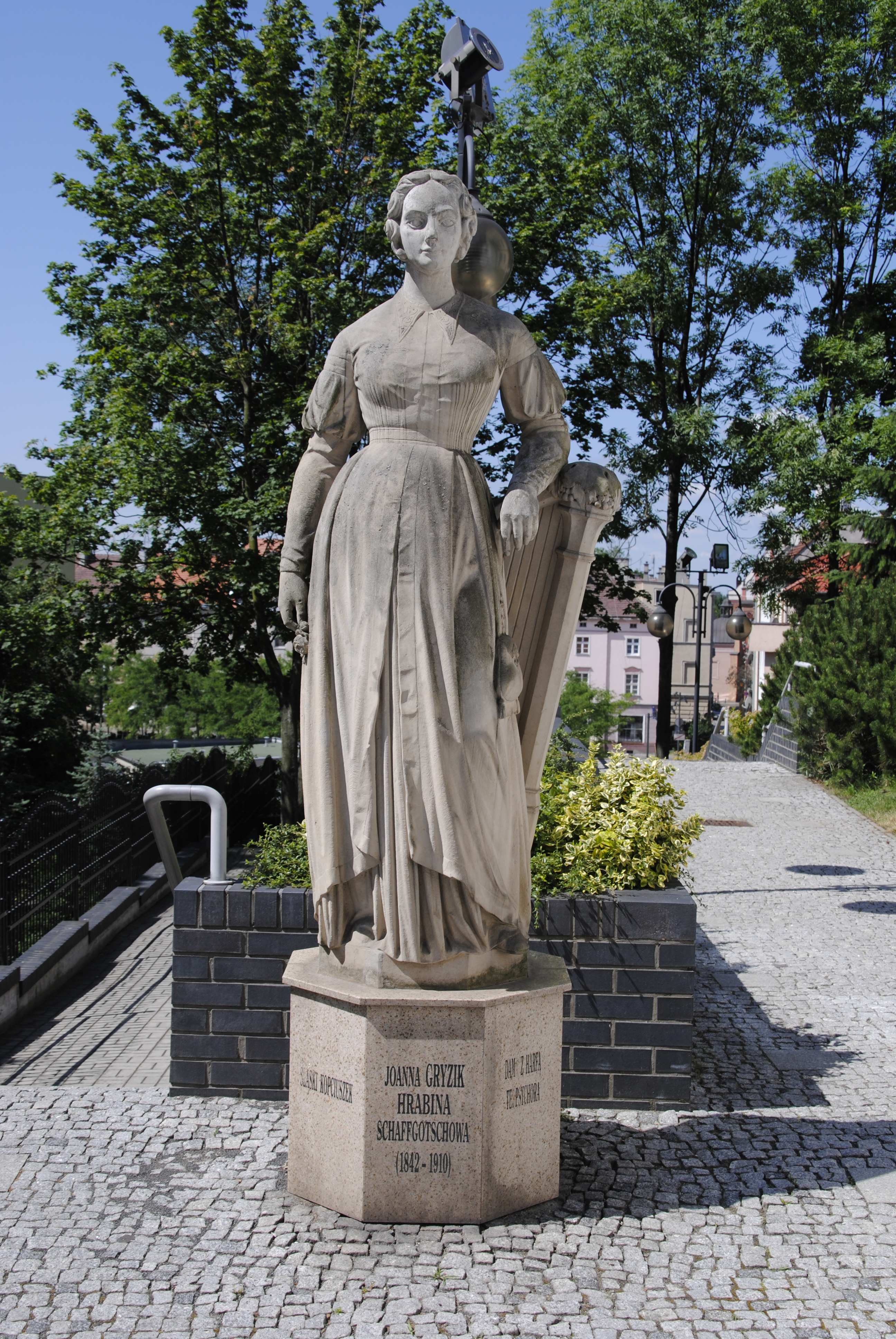 Statue von Johanna von Schaffgotsch in Oppeln Oberschlesien